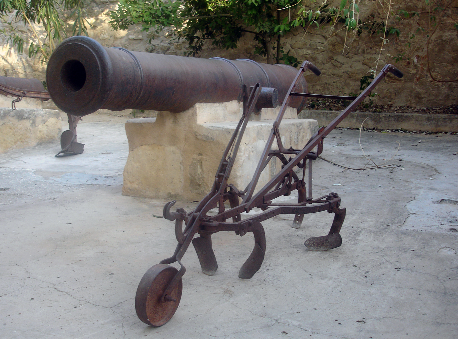 Hammamet (Tunísia) - Restes de l'atac de l'Ordre de Malta